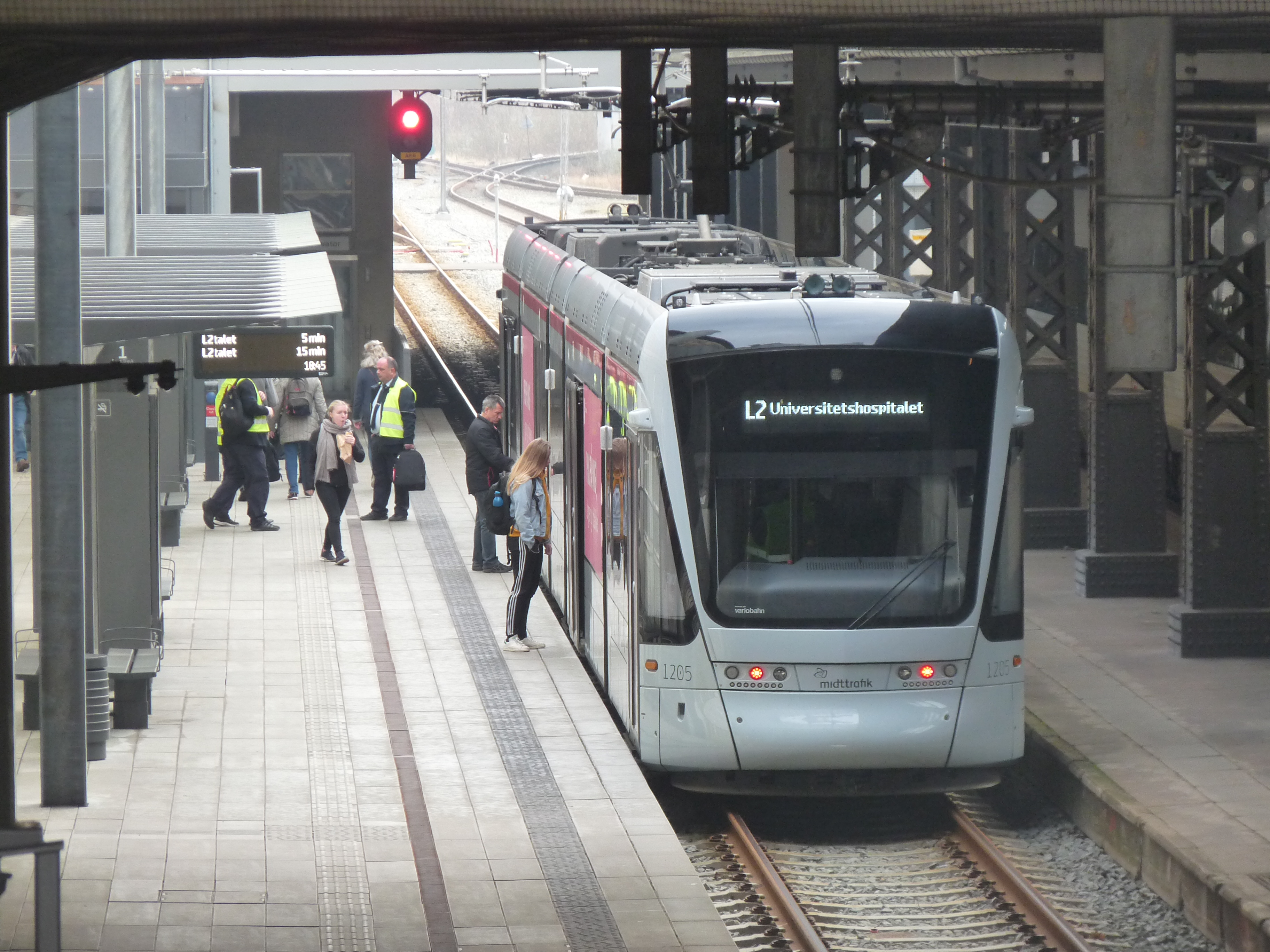 Vertrek tram in Aarhus station